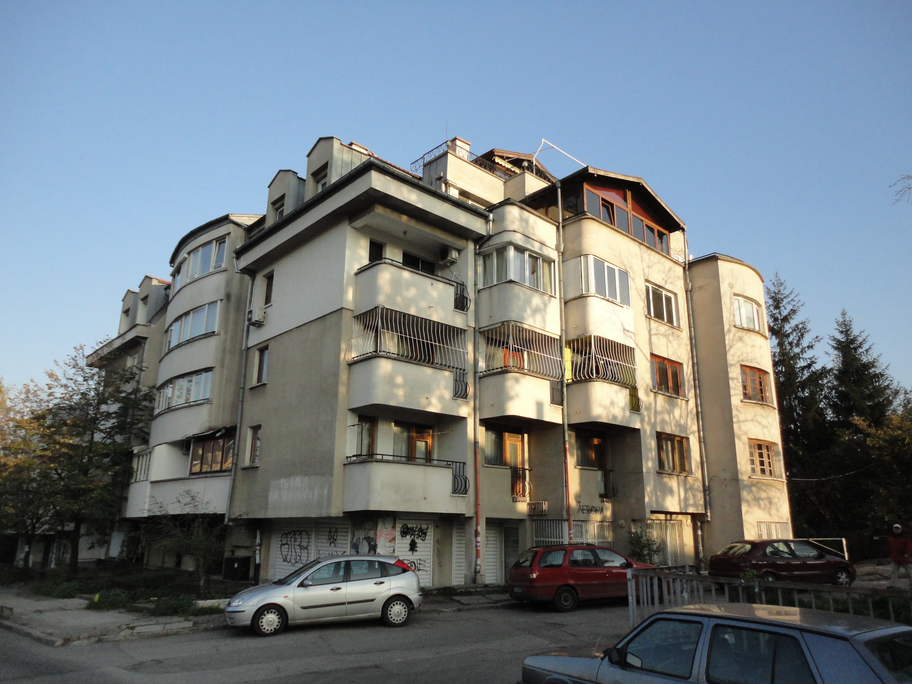 Жилищна сграда на бул. Цар Борис III